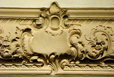 Motiv: Deckenstuck selbstfotografiert asb